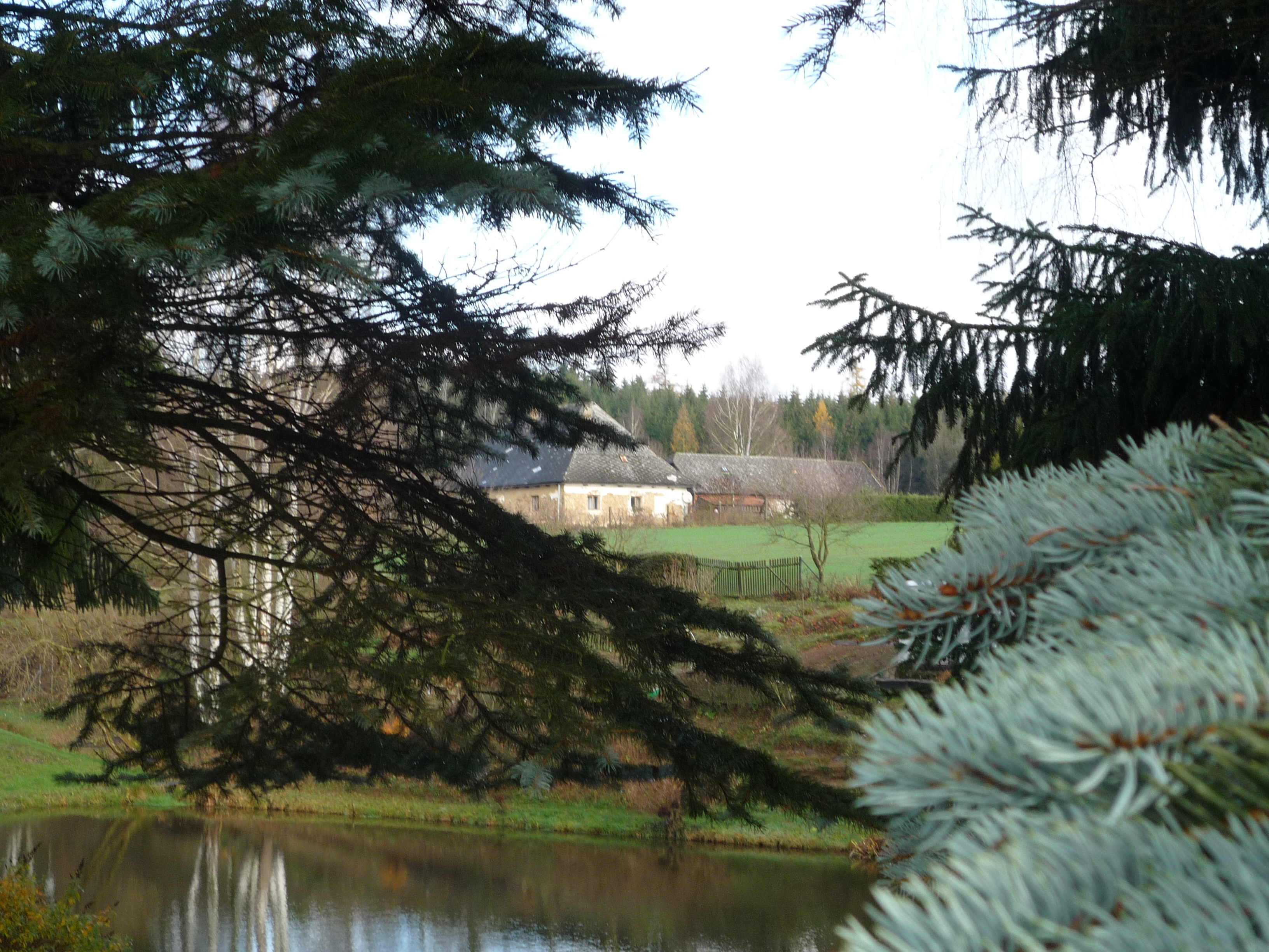 Autor fotografie Jiří Zelenka. Toulky Vysočinou. Sklárna sv. Jiří. Doprovodný text viz. Pamětní kniha 700 let založení a 20. výročí osvobození obce Pohled. Osada Rouštány. Pohled okr. Havlíčkův Brod. Kraj Vysočina. Czech Republik.